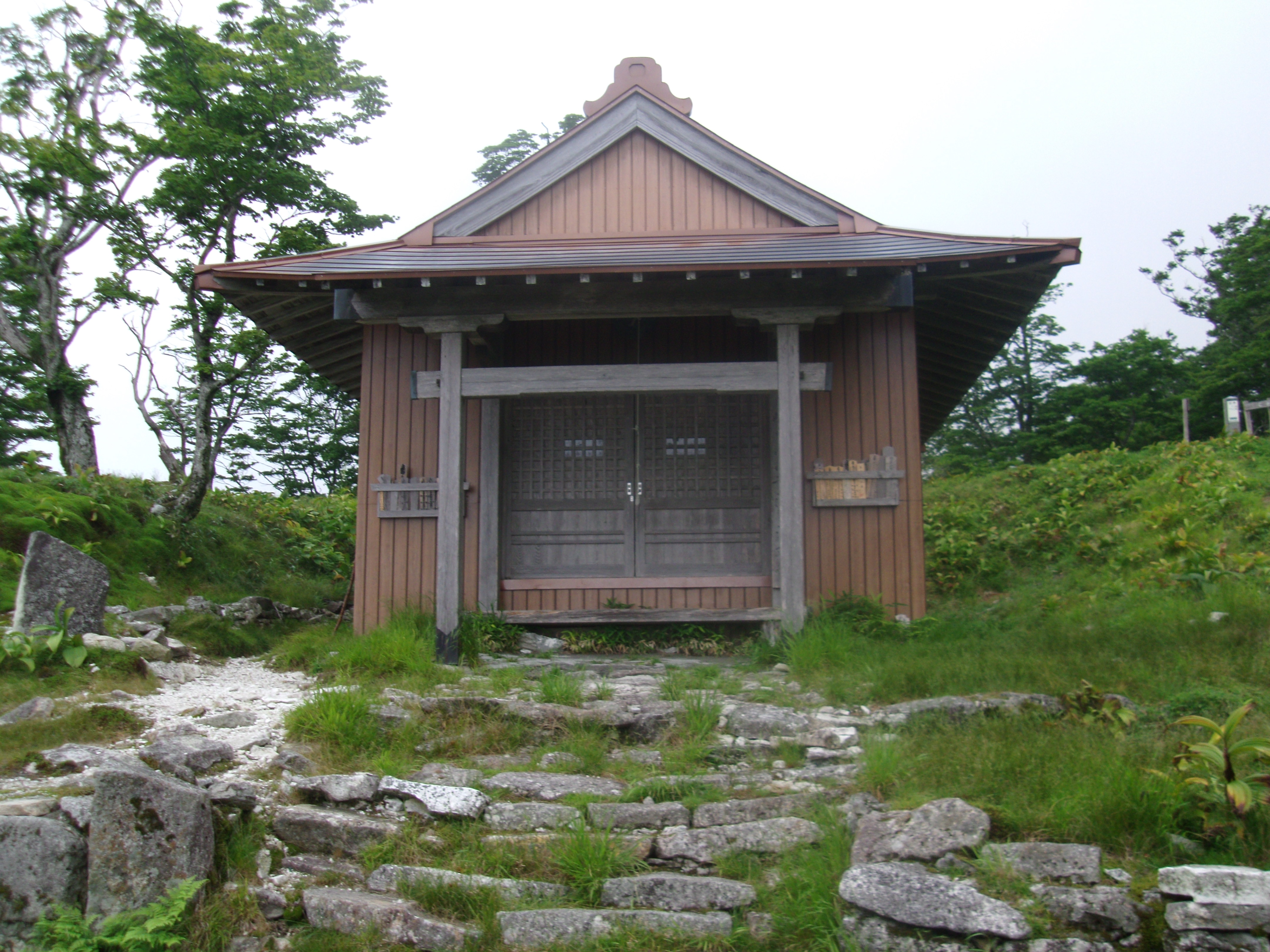 大峯奥駈道第38靡「深仙宿」の深仙灌頂堂